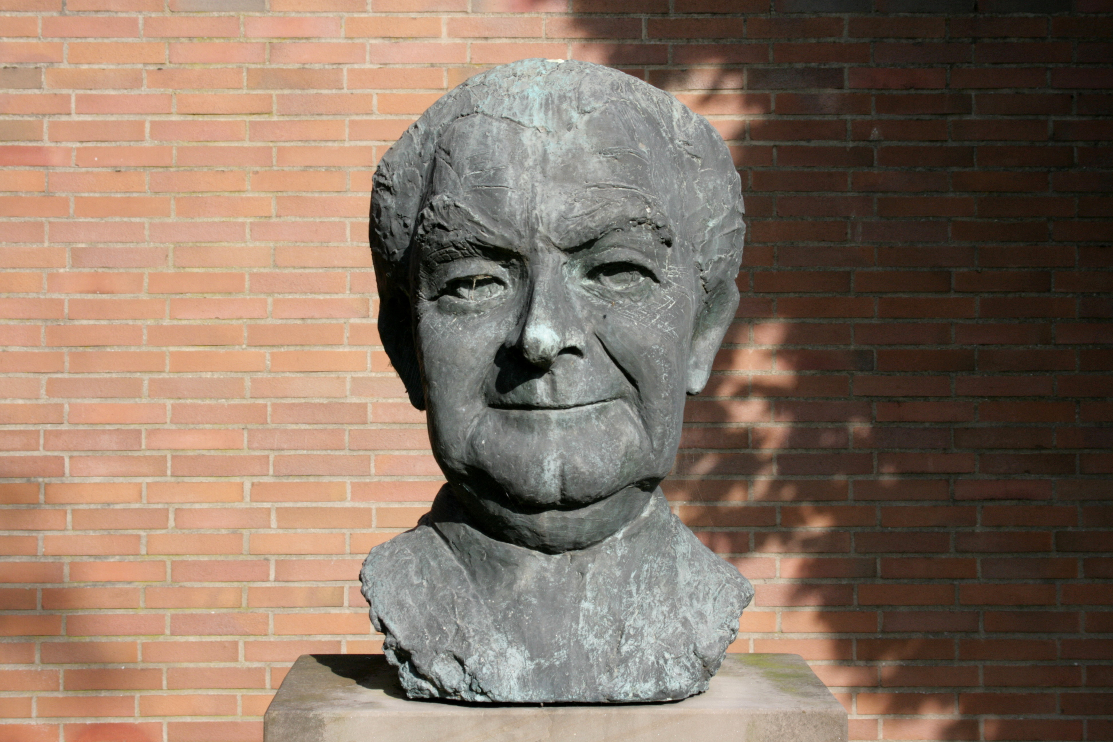 Theodor-Heuss-Akademie der Friedrich-Naumann-Stiftung für die Freiheit, Theodor-Heuss-Str. 26 in Gummersbach